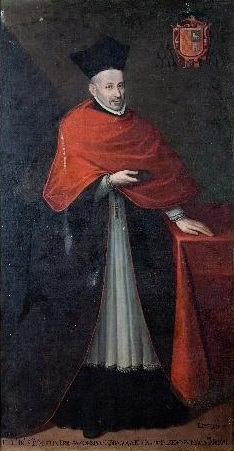 Retrato del prelado español Martín Terrer de Valenzuela (1549-1631), que fue arzobispo de Zaragoza y obispo de Teruel, Tarazona y Albarracín.